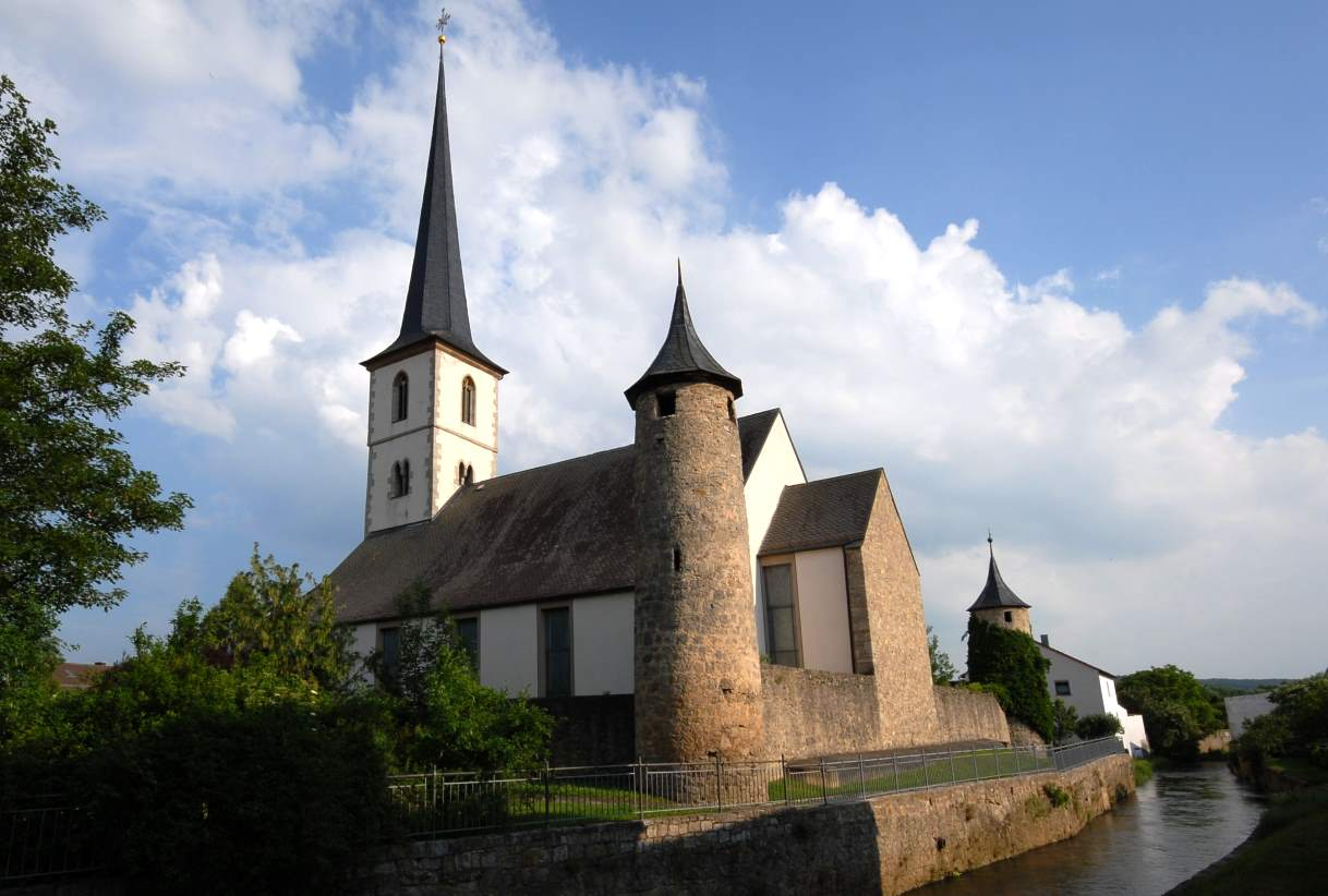 Heustreu, Pfarrkirche "Epiphania" Domini mit Kirchenburg